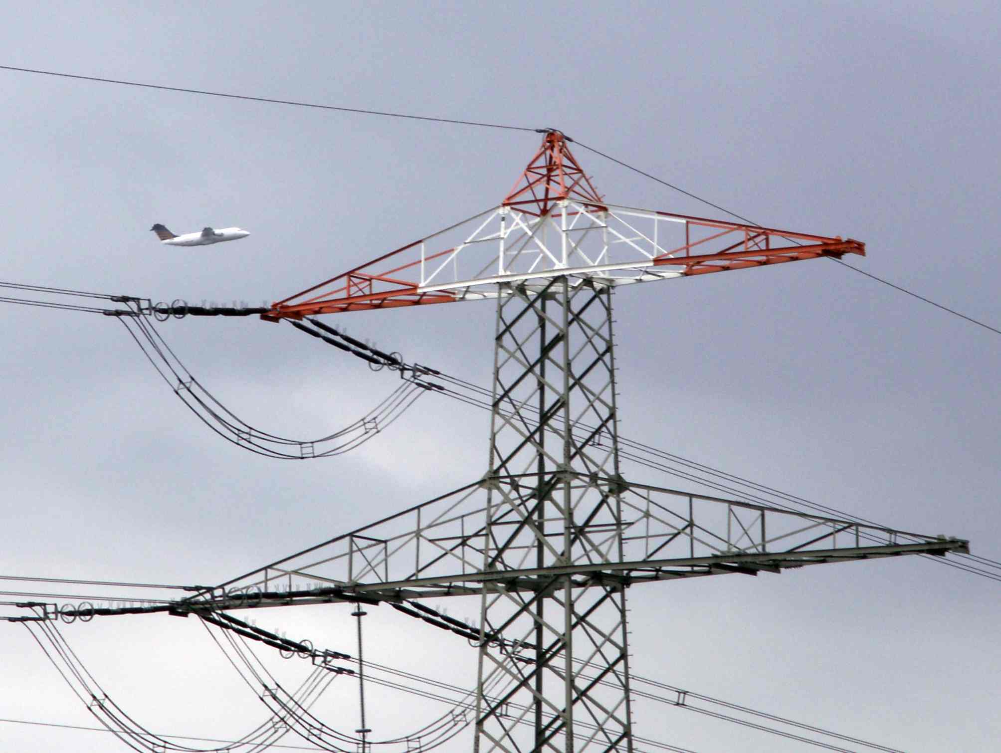 Rot-weiß gestrichener Höchstspannungsmast (380 kV einkreisig, Bl. 4153) am Autobahnkreuz Düsseldorf-Nord östlich vom Flughafen Düsseldorf